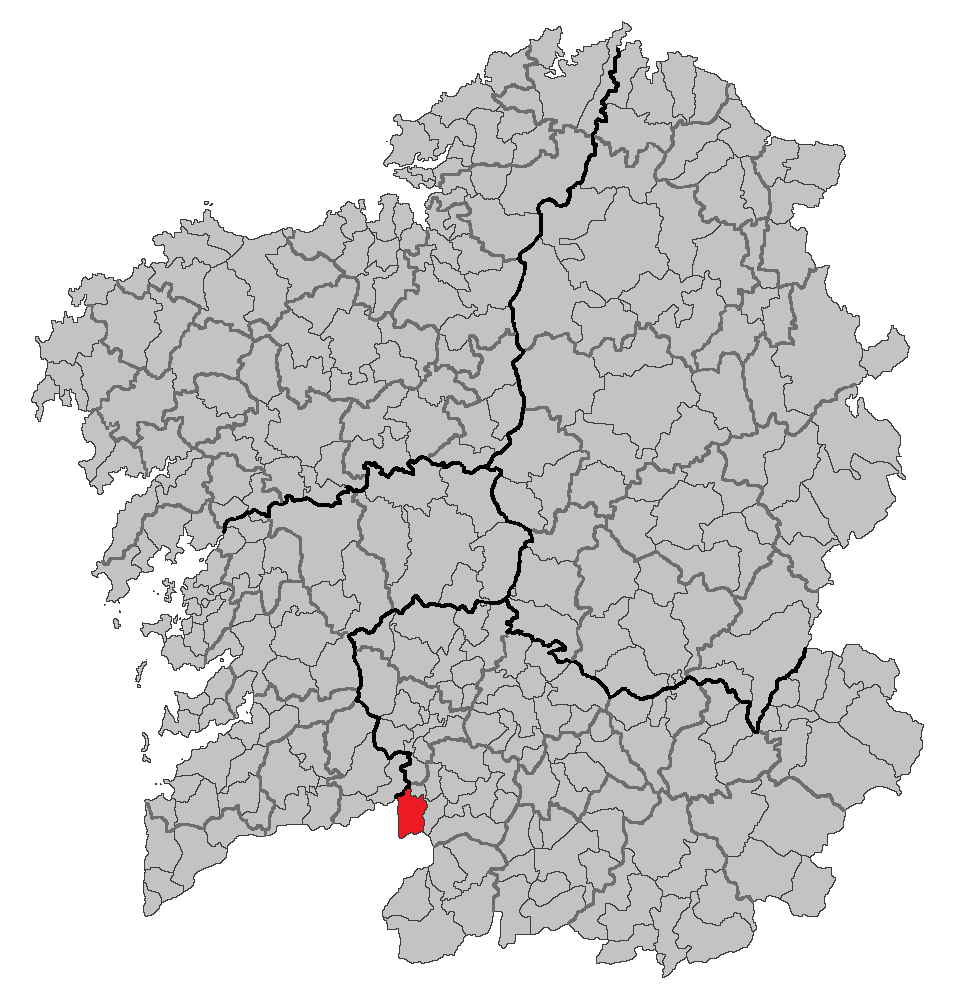 Mapa coa localización do concello de Padrenda.